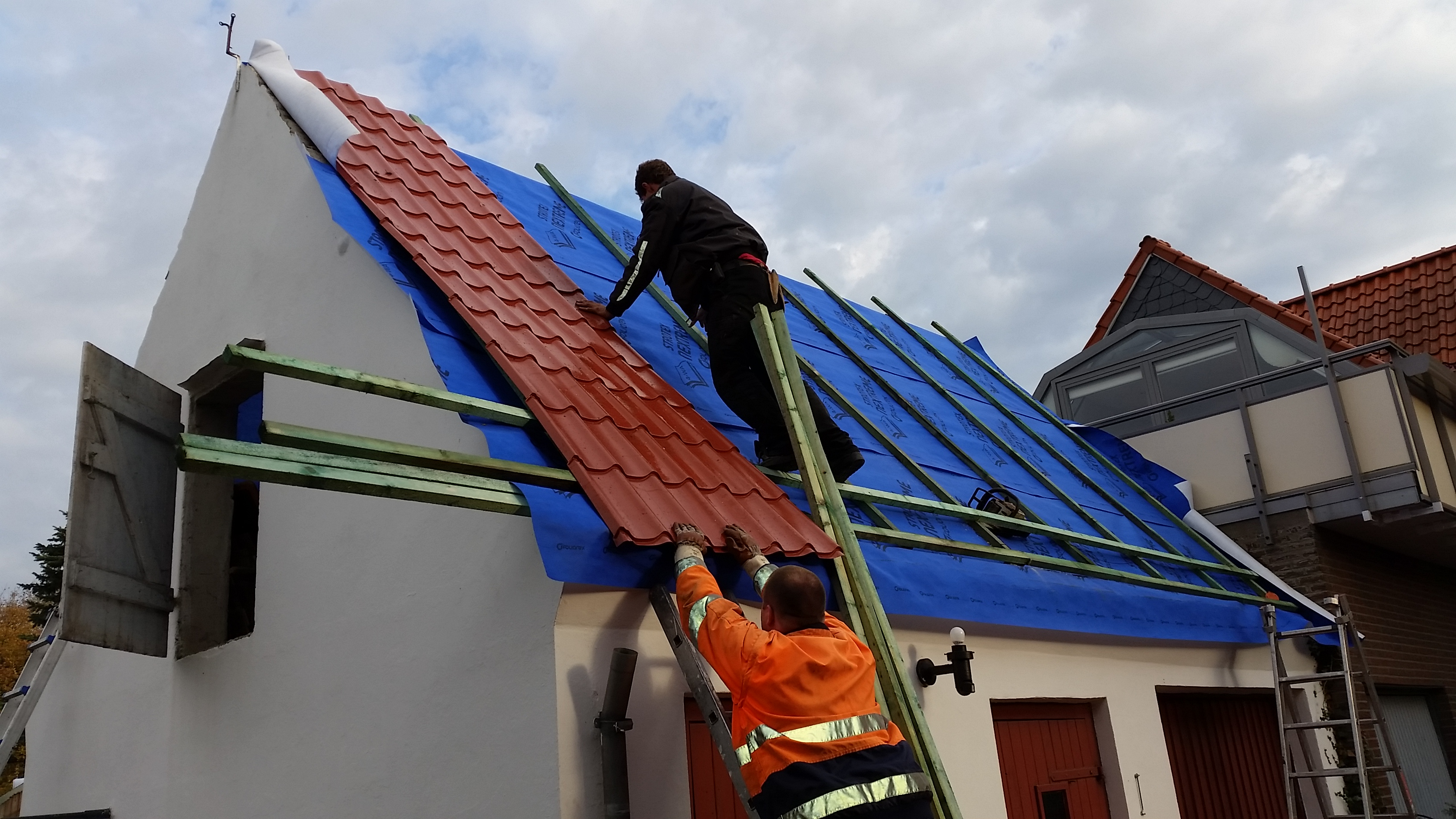 Dachpfannenprofil Nordblech Klassik auf Nebengebäude decken